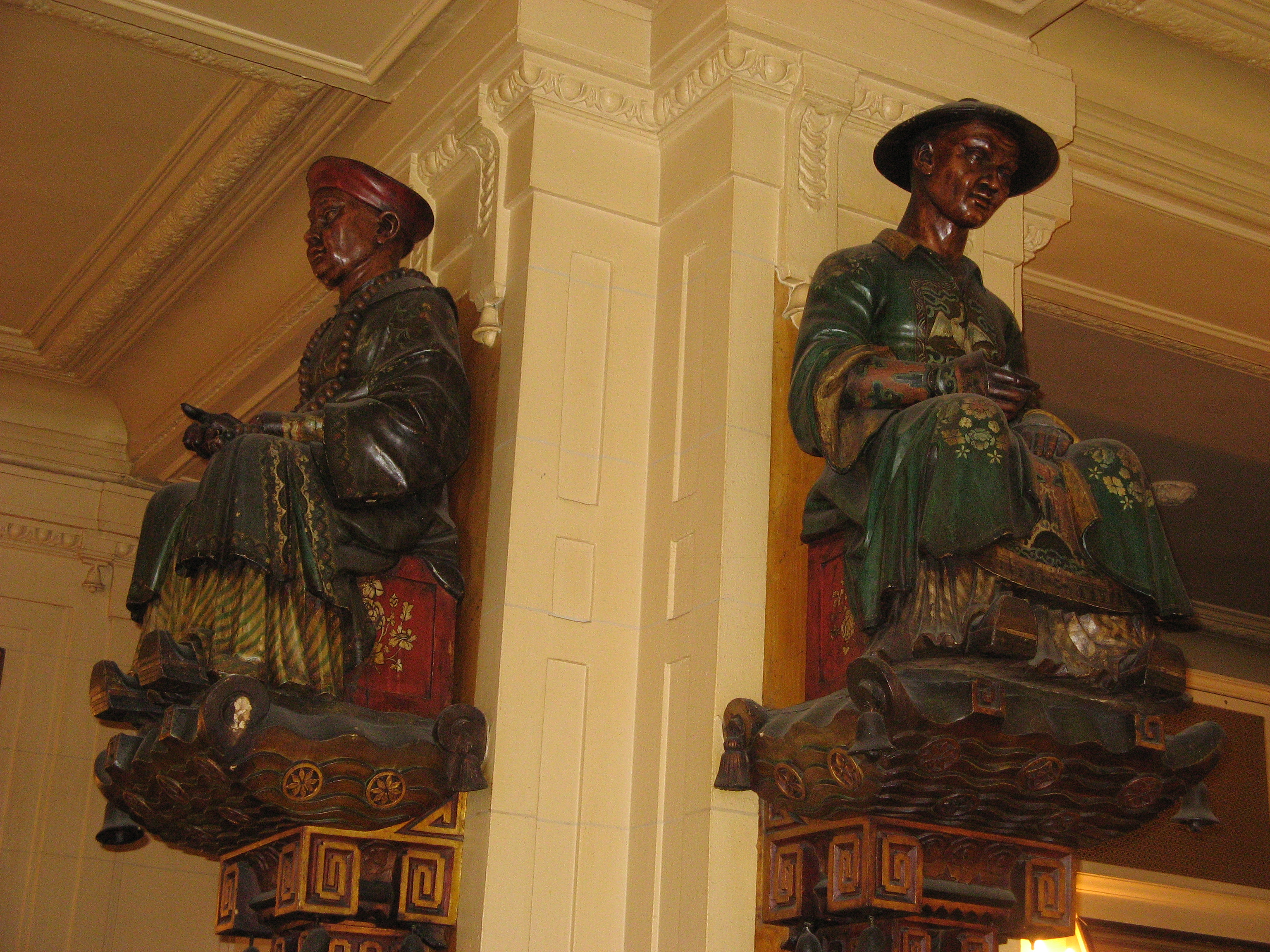 Statues, Les_Deux_Magots, Paris